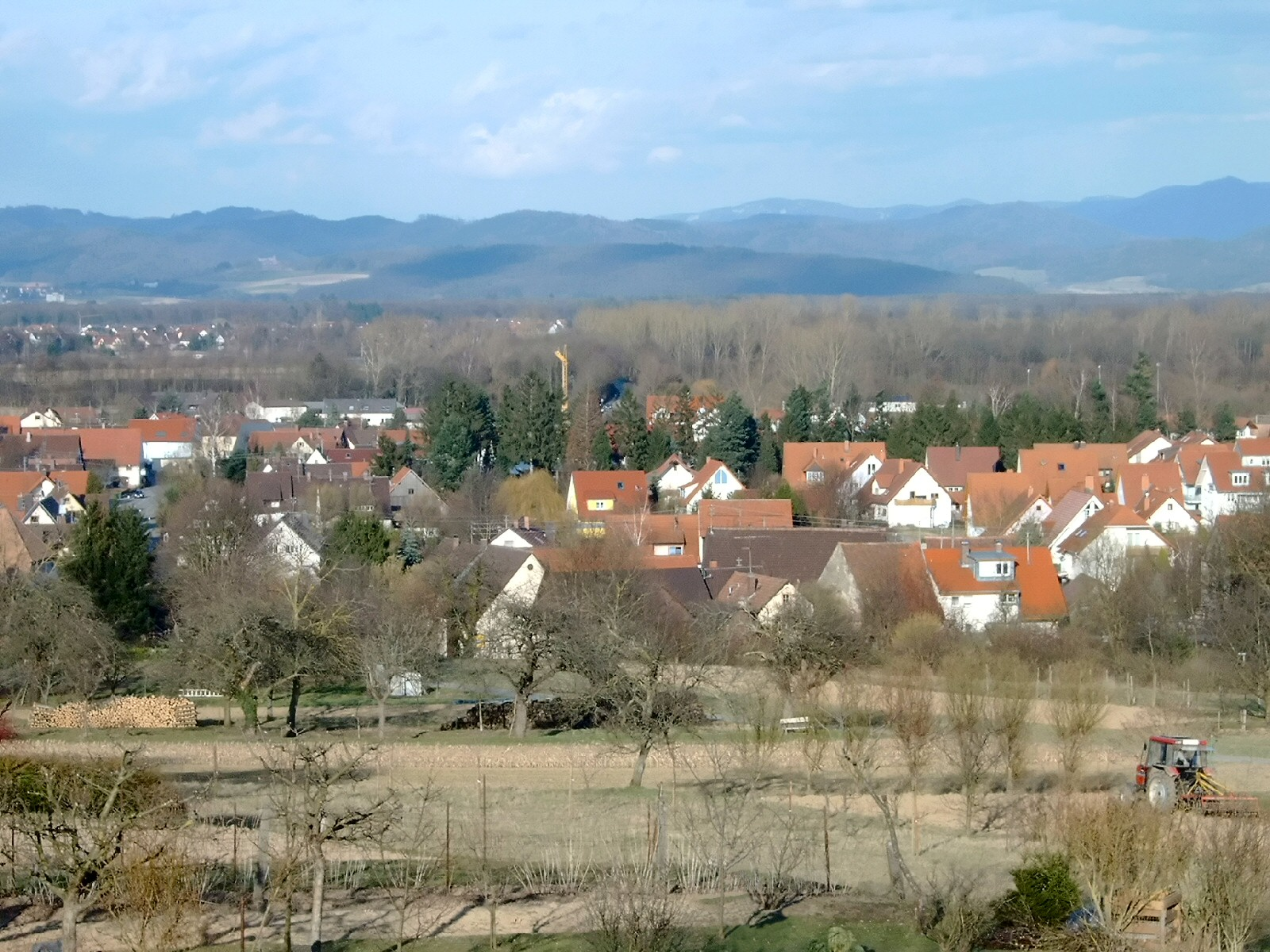 March (Breisgau), Ortschaft Holzhausen